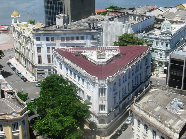 Edifícios históricos no Bairro do Recife - Recife - Pernambuco - Brasil